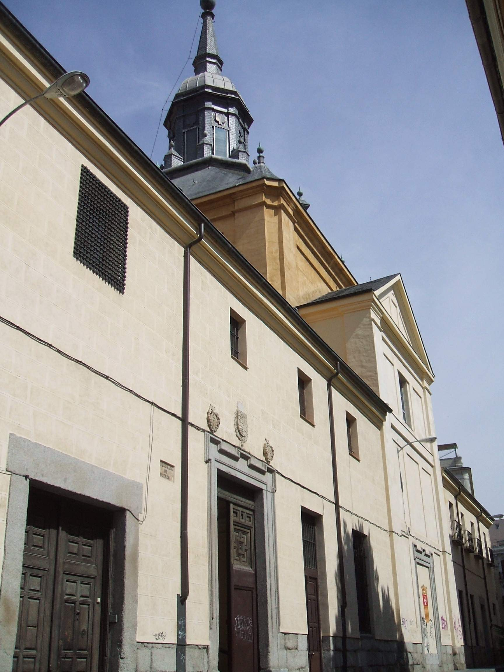 Convento de Nuestra Señora de la Concepción, o de las Góngoras (MM Mercedarias Descalzas), Madrid